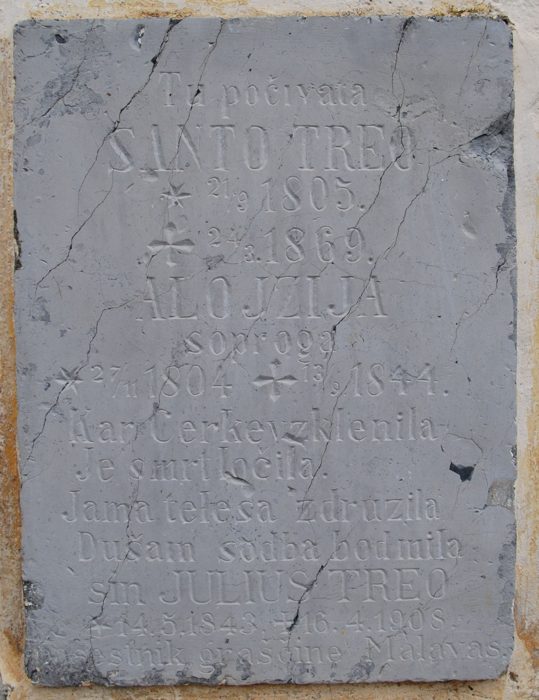 Nagrobnik Santa Trea mlajšega in njegove žene Alojzije na zunanji levi steni župnijske cerkve sv. Jurija v Dobrniču (občina Trebnje, Slovenija); začetek 20. stoletja. Besedilo: "Tu počivata Santo Treo (21. 9. 1805 - 24. 3. 1869); Alojzija, soproga (27. 11. 1804 - 13. 9. 1844). Kar cerkev zklenila, je smrt ločila. Jama telesa združila. Dušam sodba bodi mila."